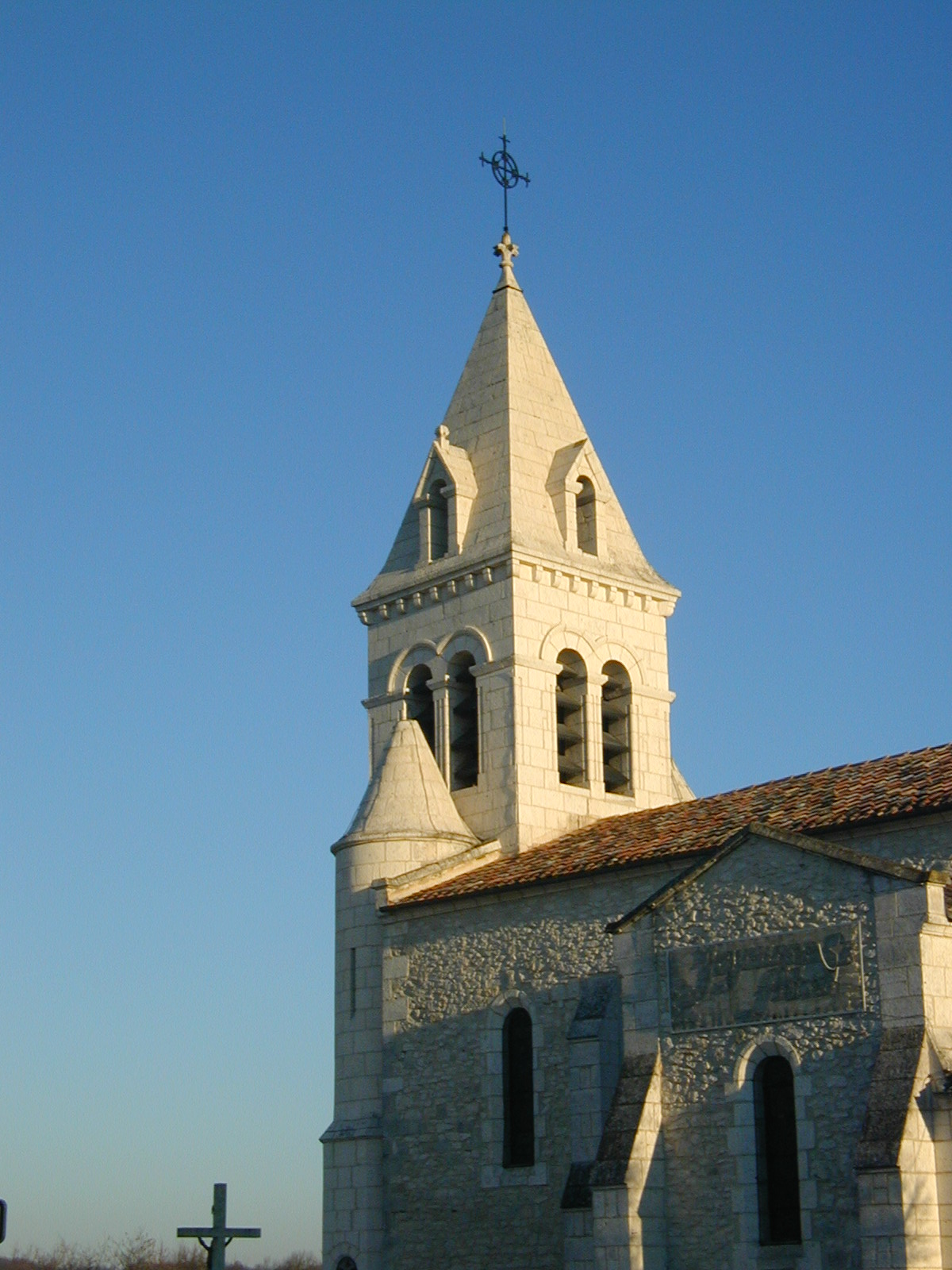 Lacaussade